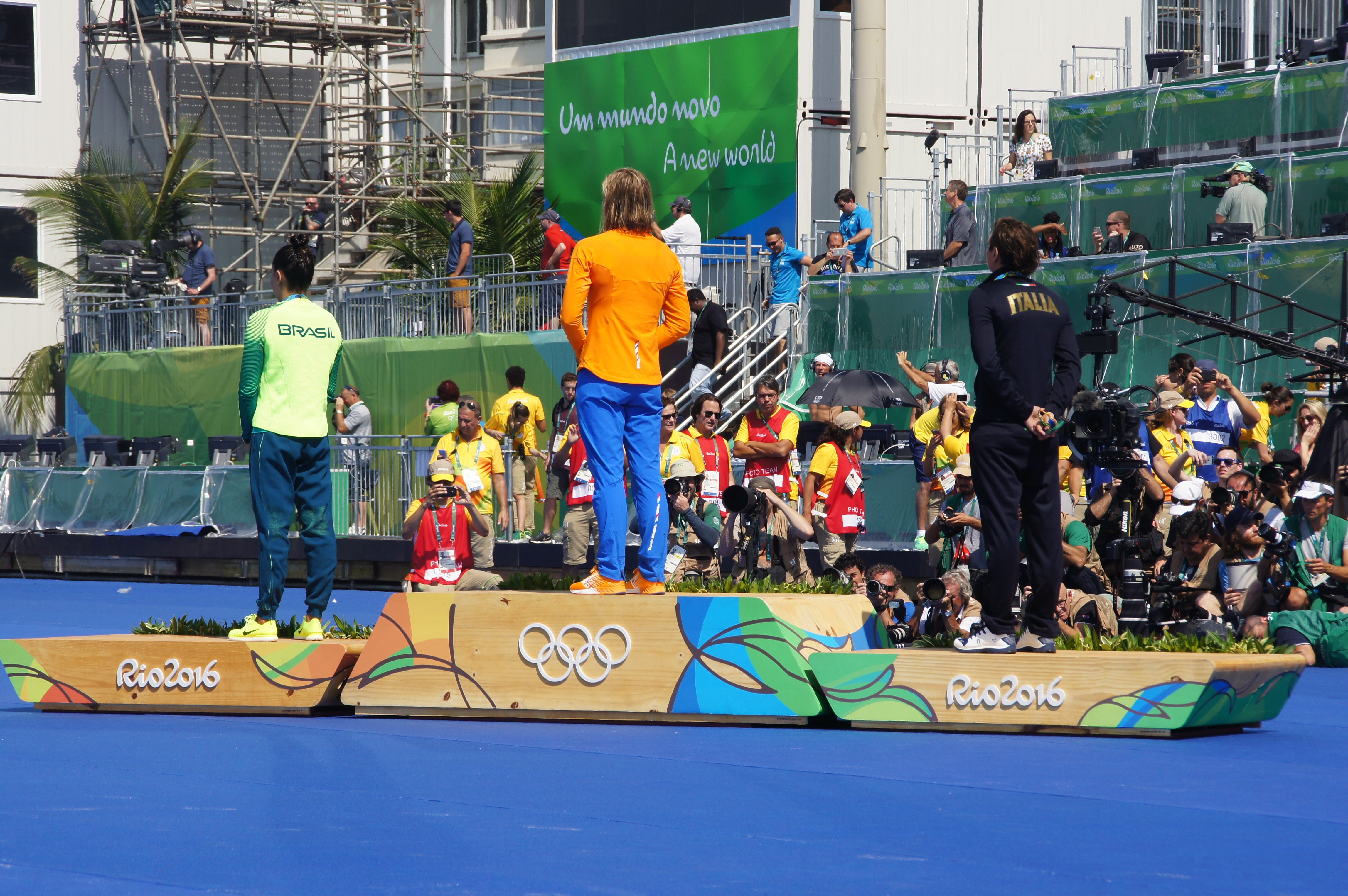 slt.a33